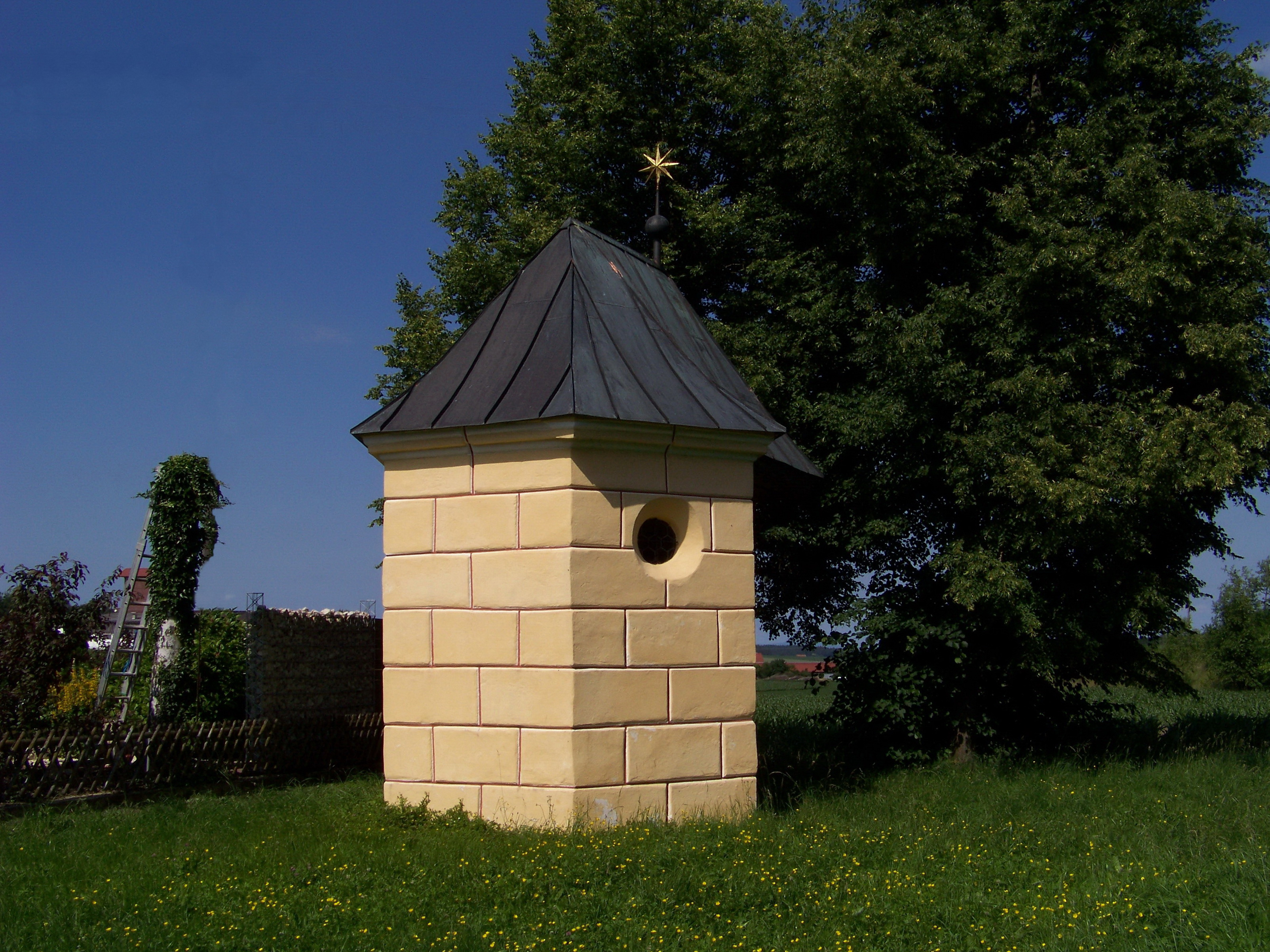 Thürnthenning, Kapelle, sog. Wies-Kapelle, Zentralbau (Hexagon) mit Rustizierung und weitem Dachüberstand, um 1730/40; mit Ausstattung; am nördlichen Ortsende.